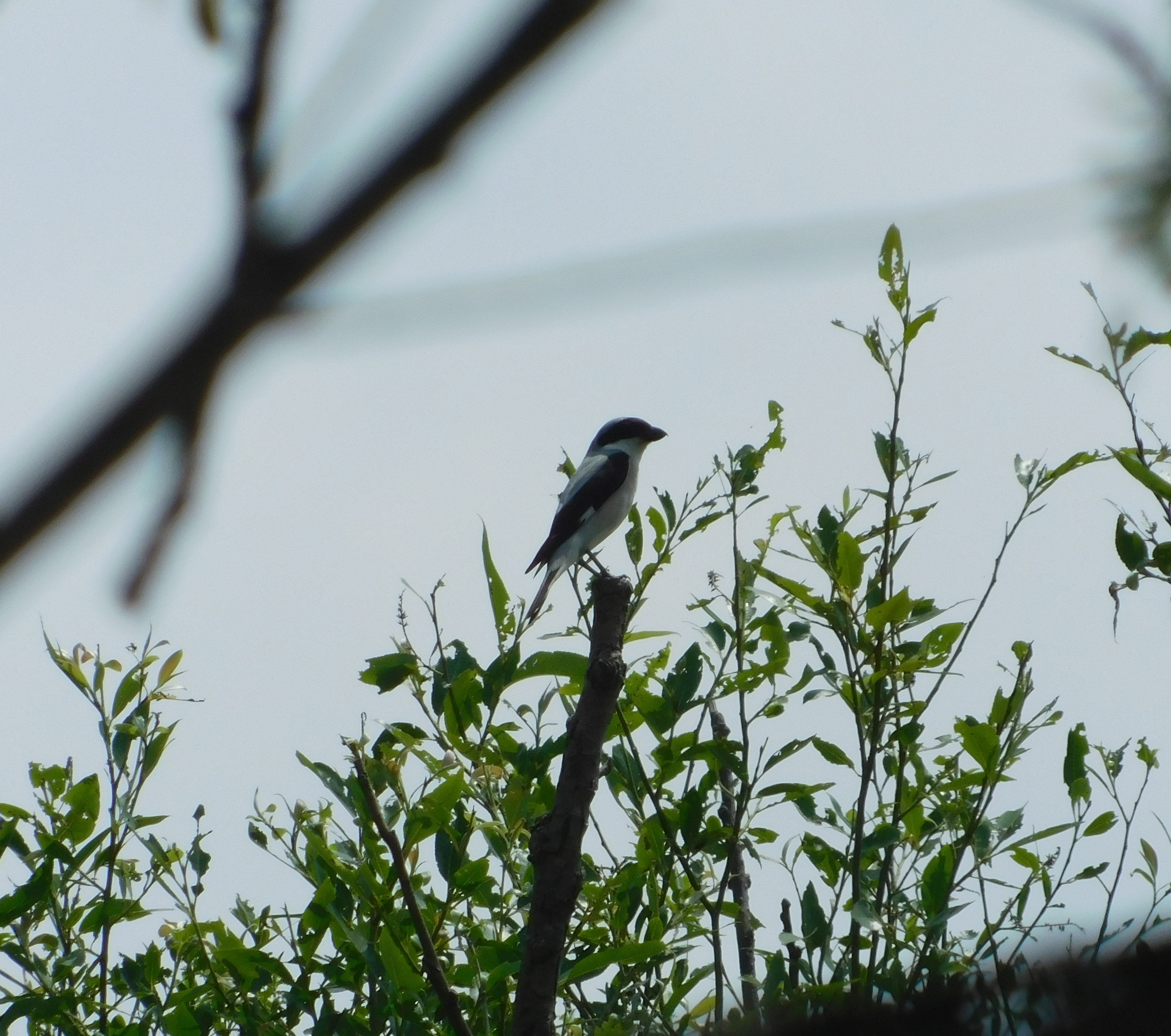 Srpski (latinica): Rasprostranjen je u južnoj i jugoistočnoj Evropi, Maloj Aziji, na Bliskom istoku i delovima centralne i zapadne Azije. Selica je, zimu provodi u podsaharskoj Africi. Staništa su mu livade, pašnjaci, stepe, slatine ili mozaična poljoprivredna područja sa drvoredima, šumarcima, žbunjem ili voćnjacima. Gnezda gradi na drveću ili žbunju. Hrani se krupnim insektima (skakavci, tvrdokrilci, vilini konjici), ređe drugim sitnim životinjama (sitni sisari, gušteri). U Evropi preovladava trend umerenog opadanja populacije, što je posledica nestajanja staništa usled intenziviranja poljoprivrede. U Srbiji se gnezdi stabilna populacija čija se brojnost procenjuje na 730–1.120 parova (Puzović et al 2015).